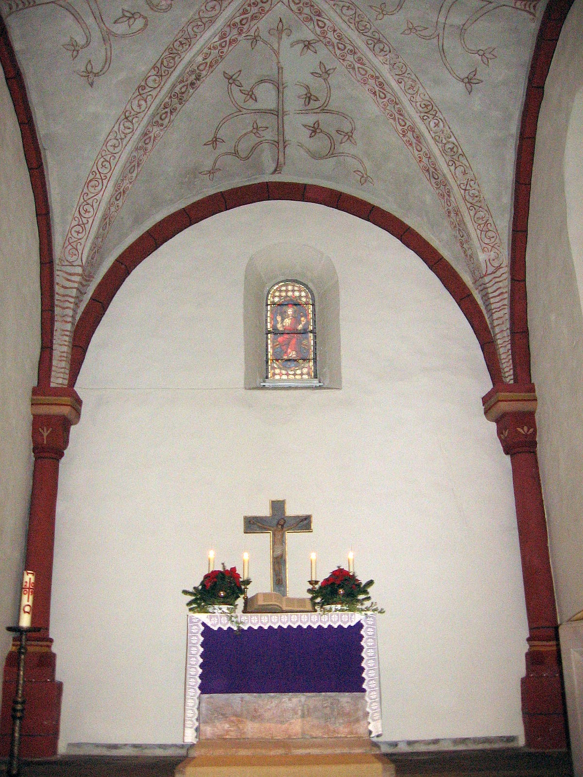 Altarraum der Martinskirche (Michelbach) mit Lebensbaumsymbolik